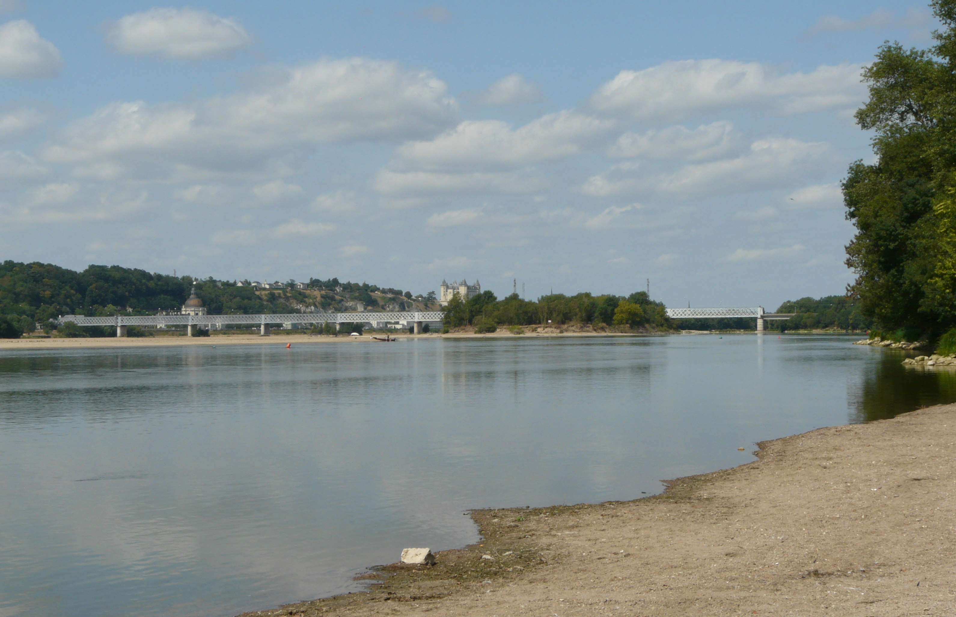 La loire depuis rive droite, au niveau de Villebernier (Maine-et-Loire, France), avec au fond le château de Saumur